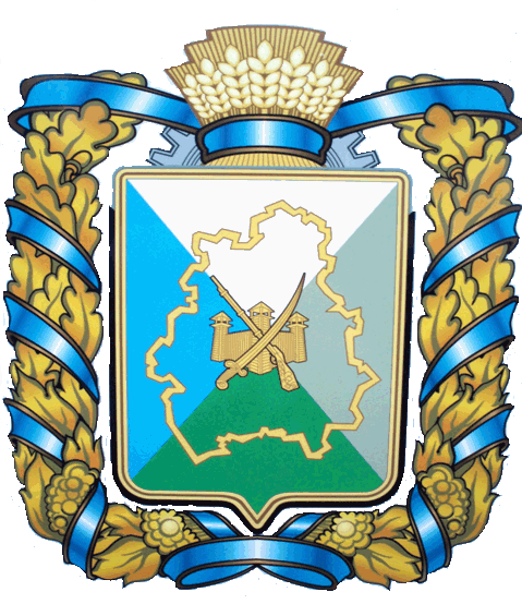 Герб Нововодолазький район